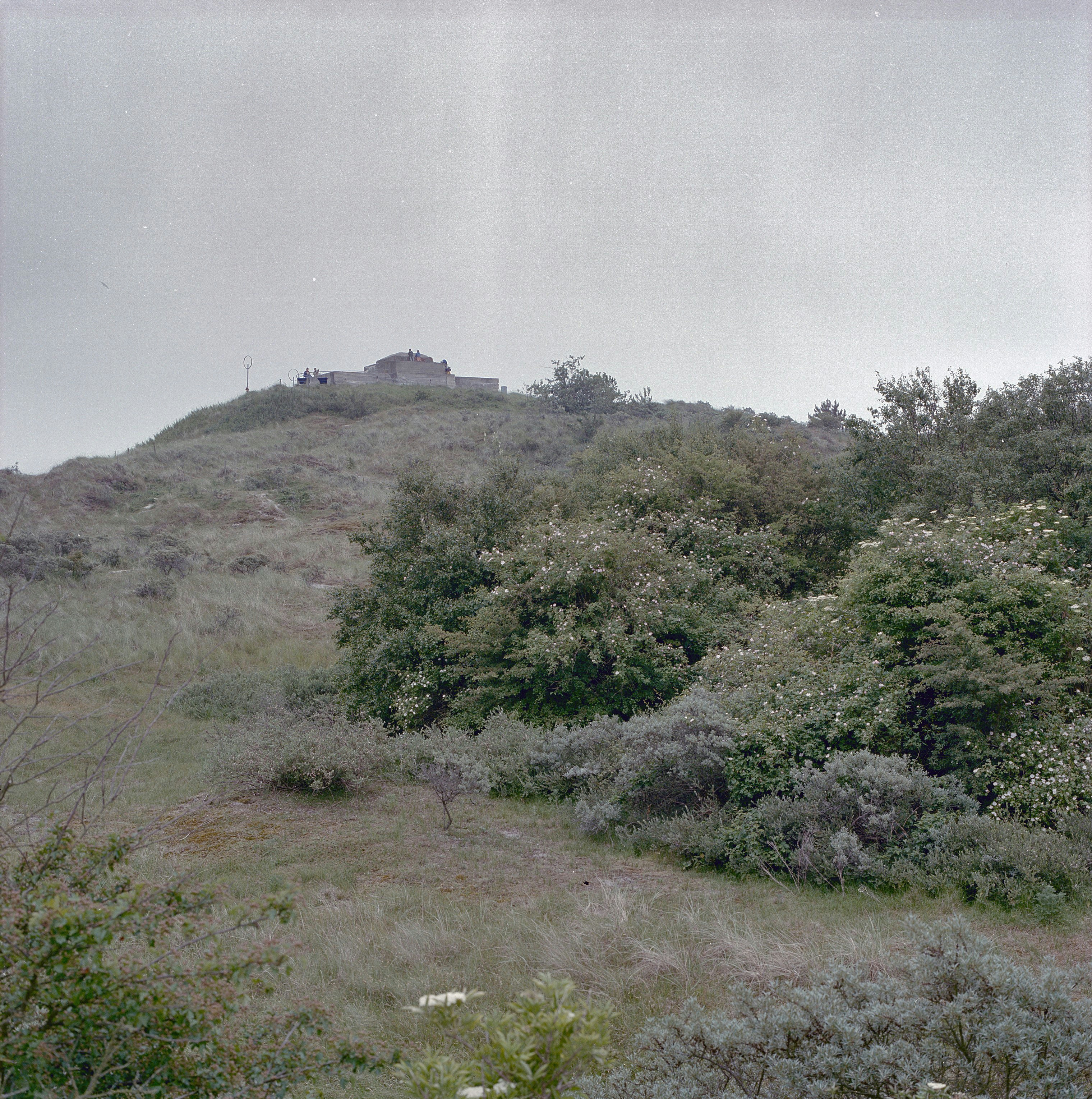 Bunker Wassermann: Exterieur overzicht , bunker van de Duitse Marineflankbatterie (opmerking: Monumenten In Nederland Friesland)